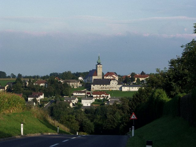 Niederneukirchen von St. Marien kommend